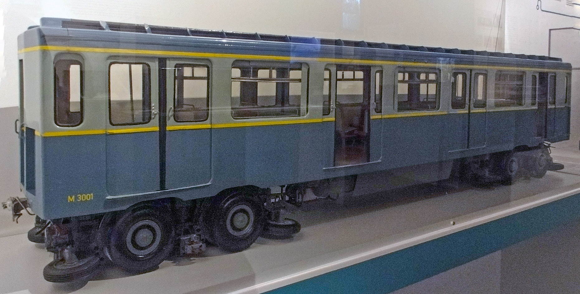 Maquette du MP 55 du métro de Paris, France.